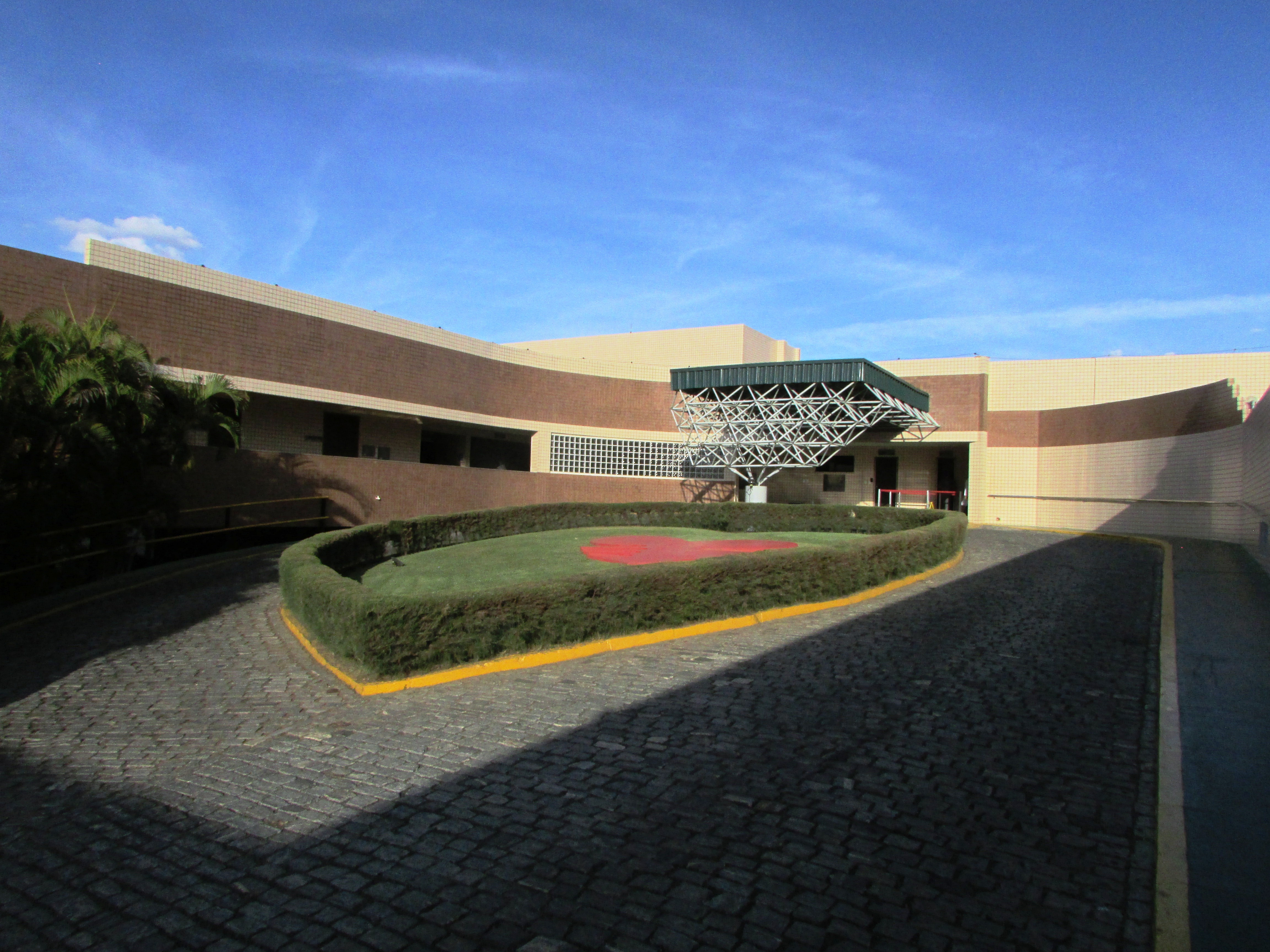 Fachada principal do Hospital do Coração